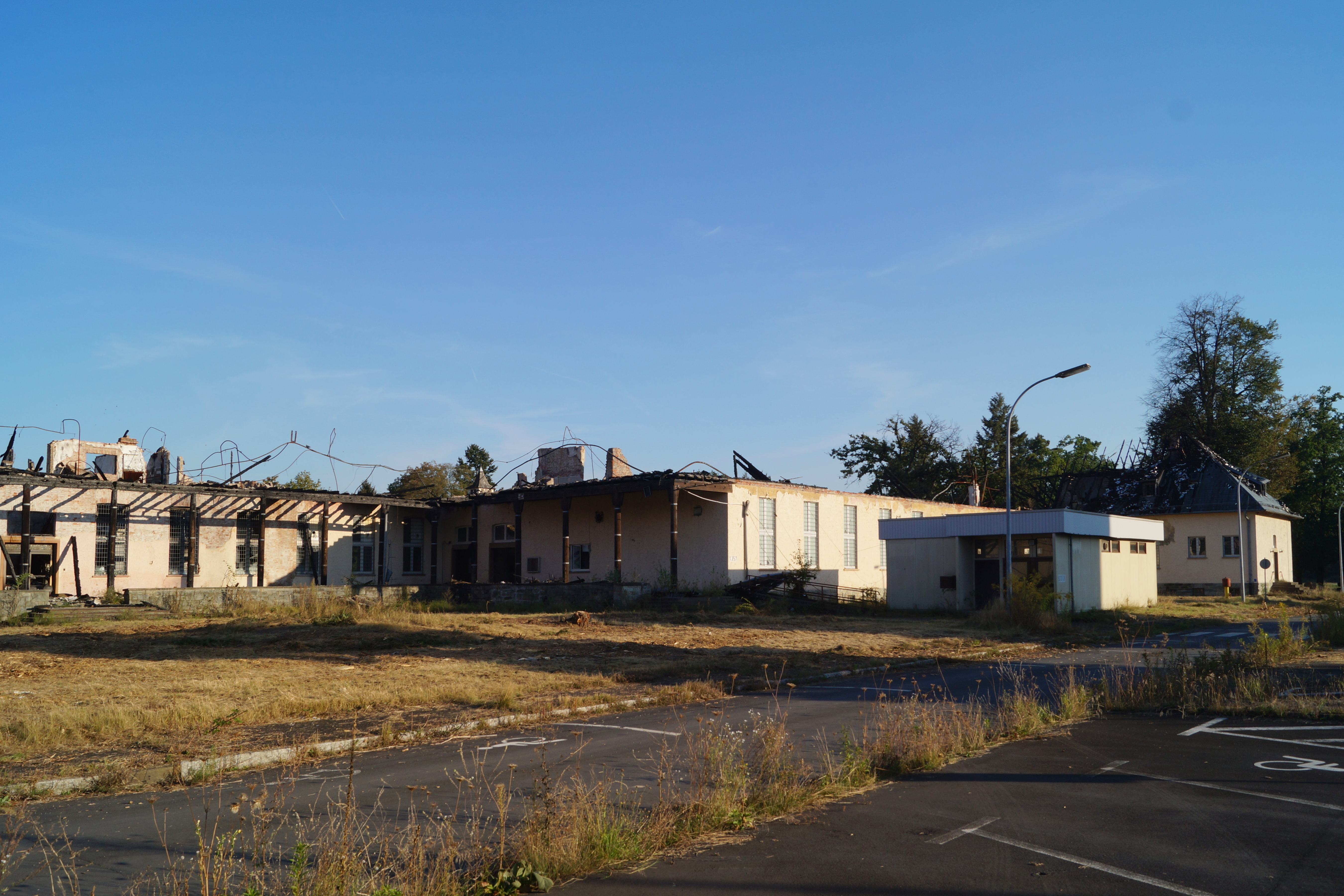 Fliegerhorst Erlensee-Langendiebach, ehemals Hanau Army Airfield. Das Ende Juli 2015 ausgebrannte Offiziersclub-Gebäude. Es soll nach Zeitungsmeldungen (FR vom 2. August 2016) nicht wieder aufgebaut werden.